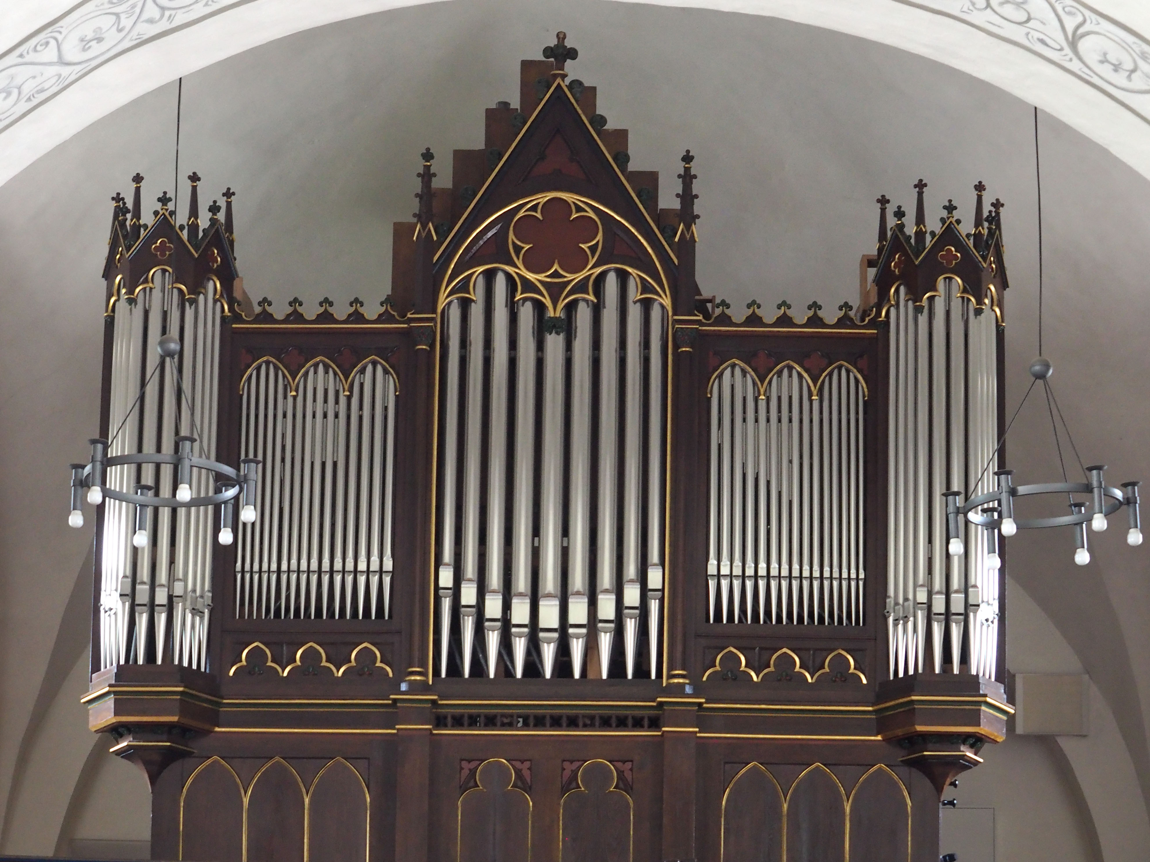 Paderborn-Neuenbeken, St. Marien, Orgel